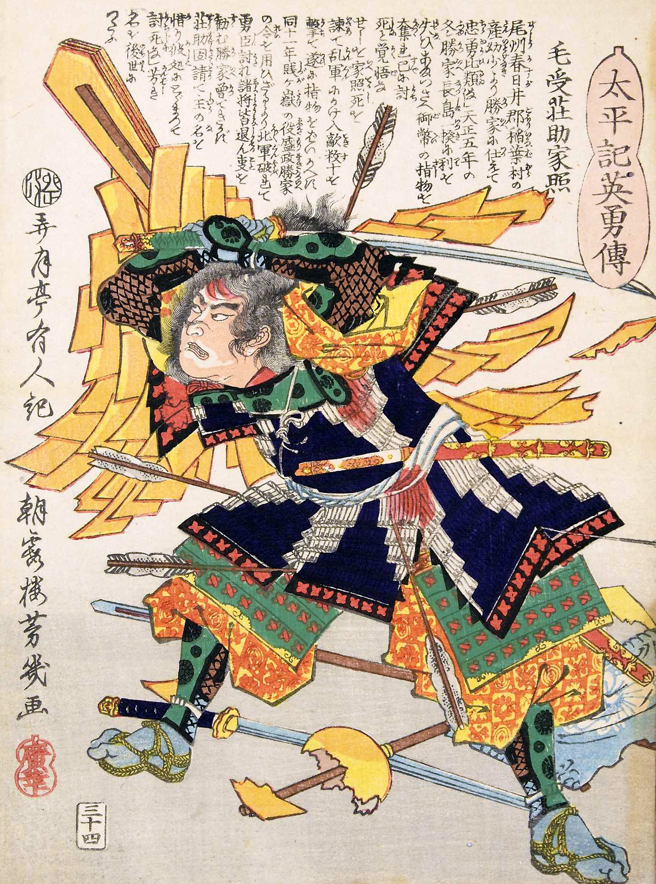 「太平記英勇伝三十四：毛受荘助家照（毛受勝照）」